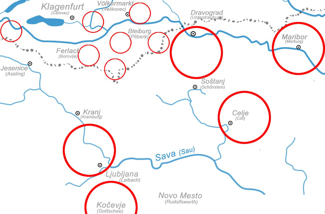 Schematische Darstellung (Dr. Rulitz): Lokalisationen der Massaker von Bleiburg im österreichischen Kärnten und Slowenien